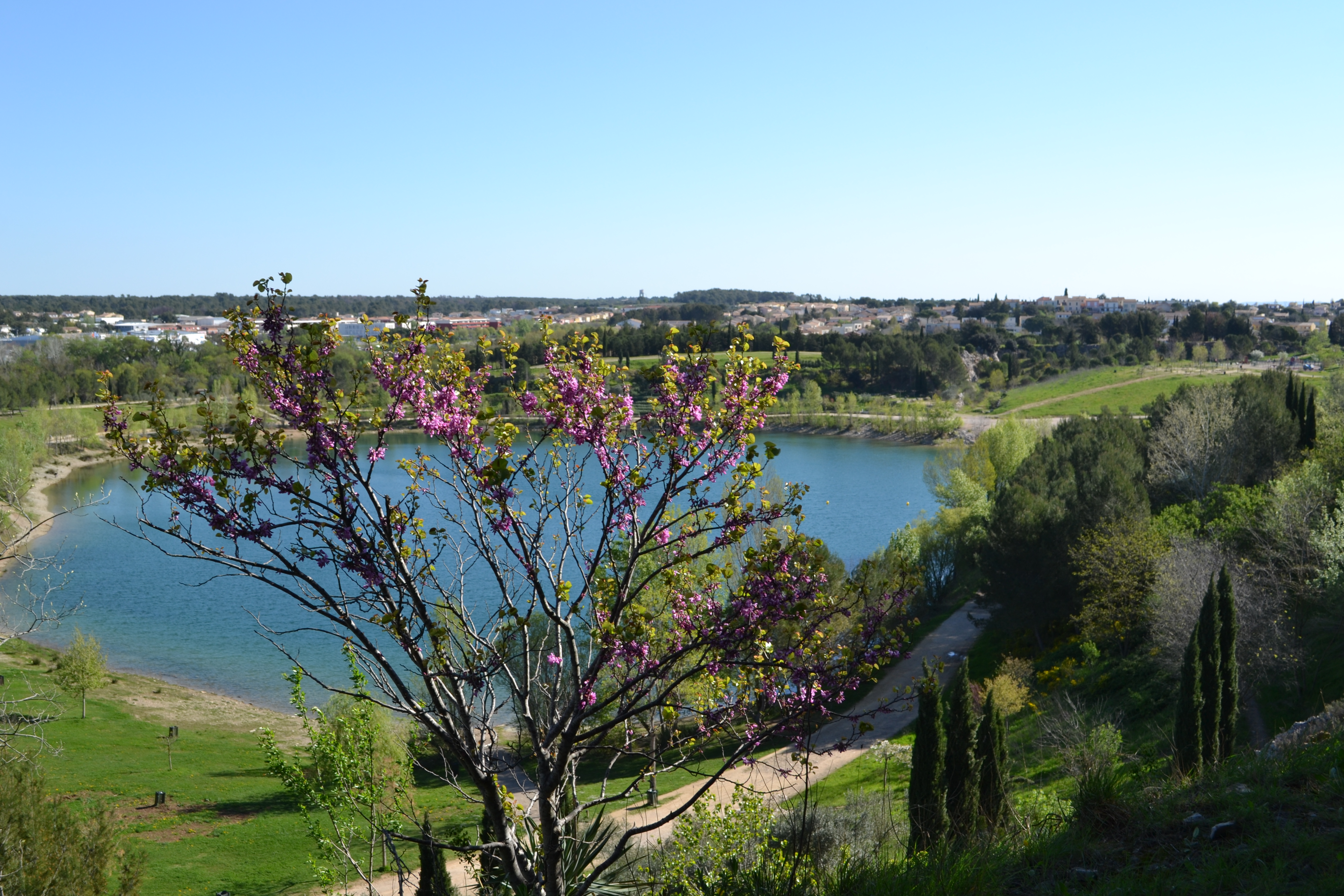 Photo du lac du Crès.